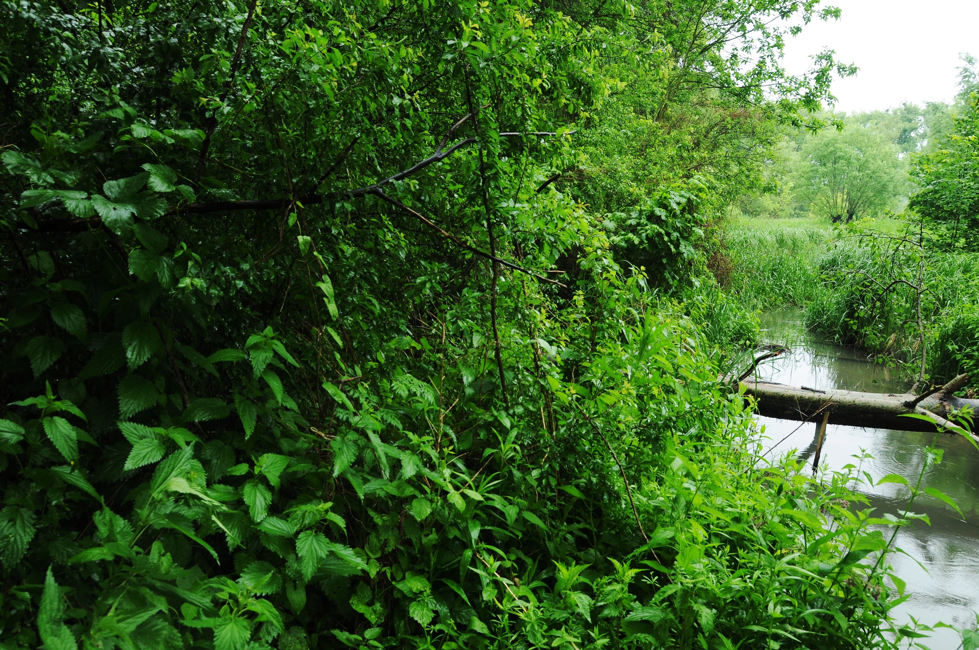 Topi Pigula´s picture. NPR Křivé jezero.